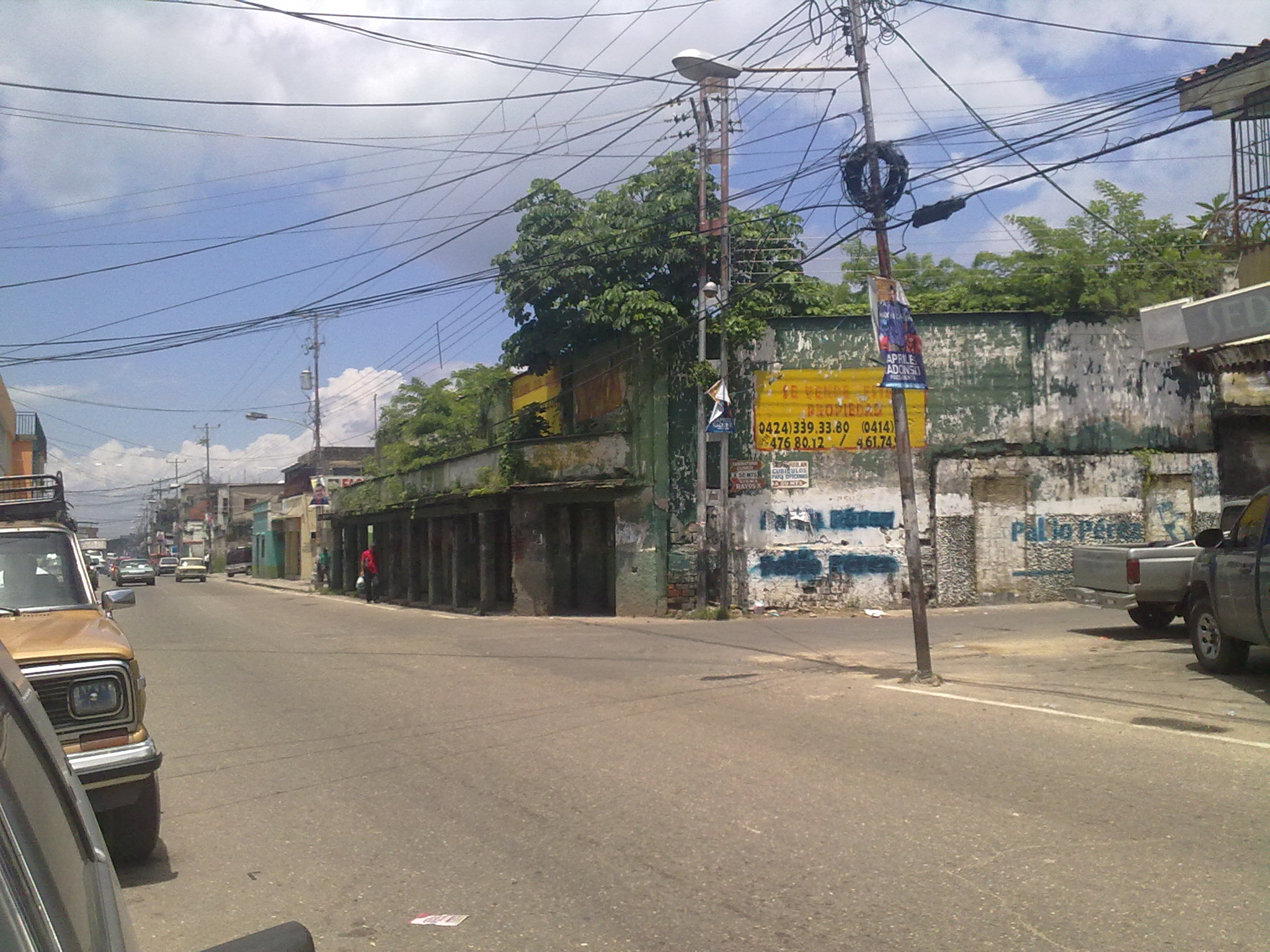 Alte Gebäude in Mariara